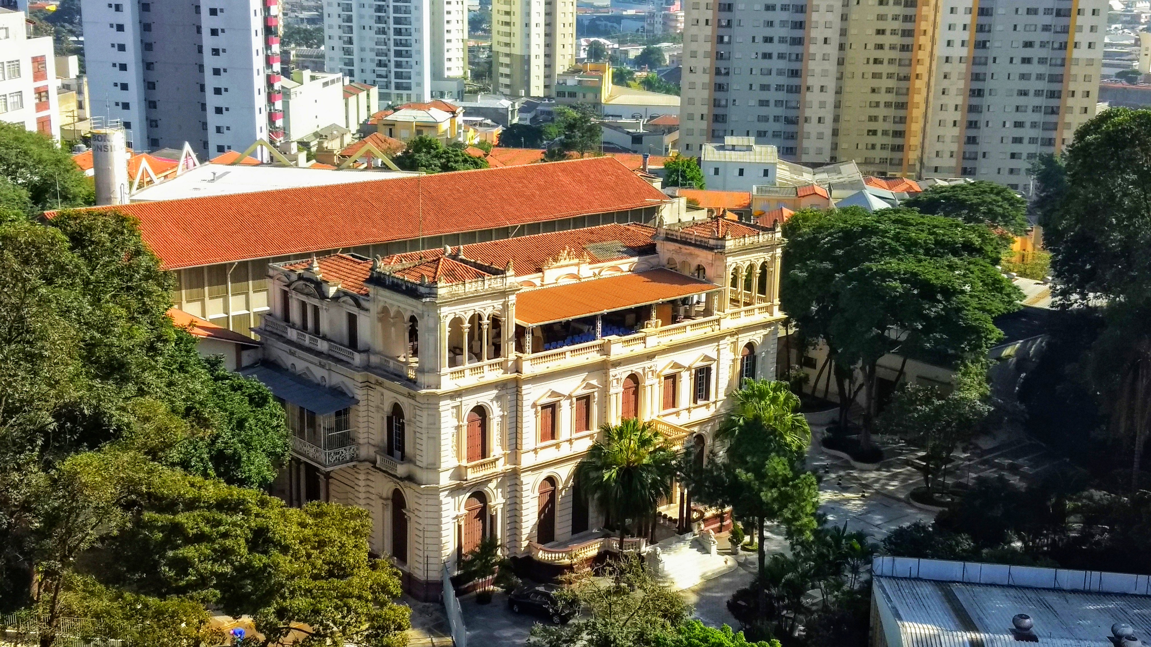 Foto do Colégio Boni Consilii, antigo Palacete da Chácara do Carvalho, projeto do arquiteto italiano Luigi Pucci encomendado pelo Conselheiro Antonio da Silva Prado (1840-1929), filho de D. Veridiana da Silva Prado. Cultural property Q18462396, São Paulo (state), Brazil Q18462396, P727